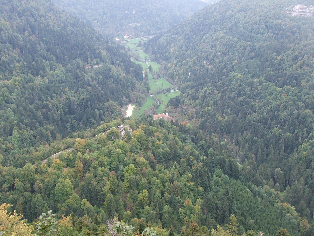 Le Val de Consolation depuis la Roche du Prêtre (Doubs - France). Image prise par Knard25.